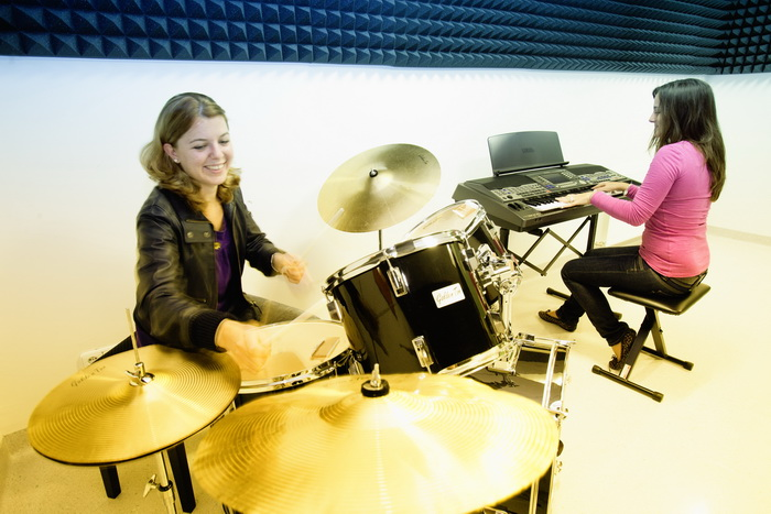 Musikzimmer